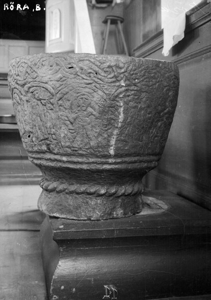 Dopfunt, från omkring 1100-tal. Snabbinv. Kategori: (04) DopfuntarDopfunt, från omkring 1100-tal. Snabbinv.